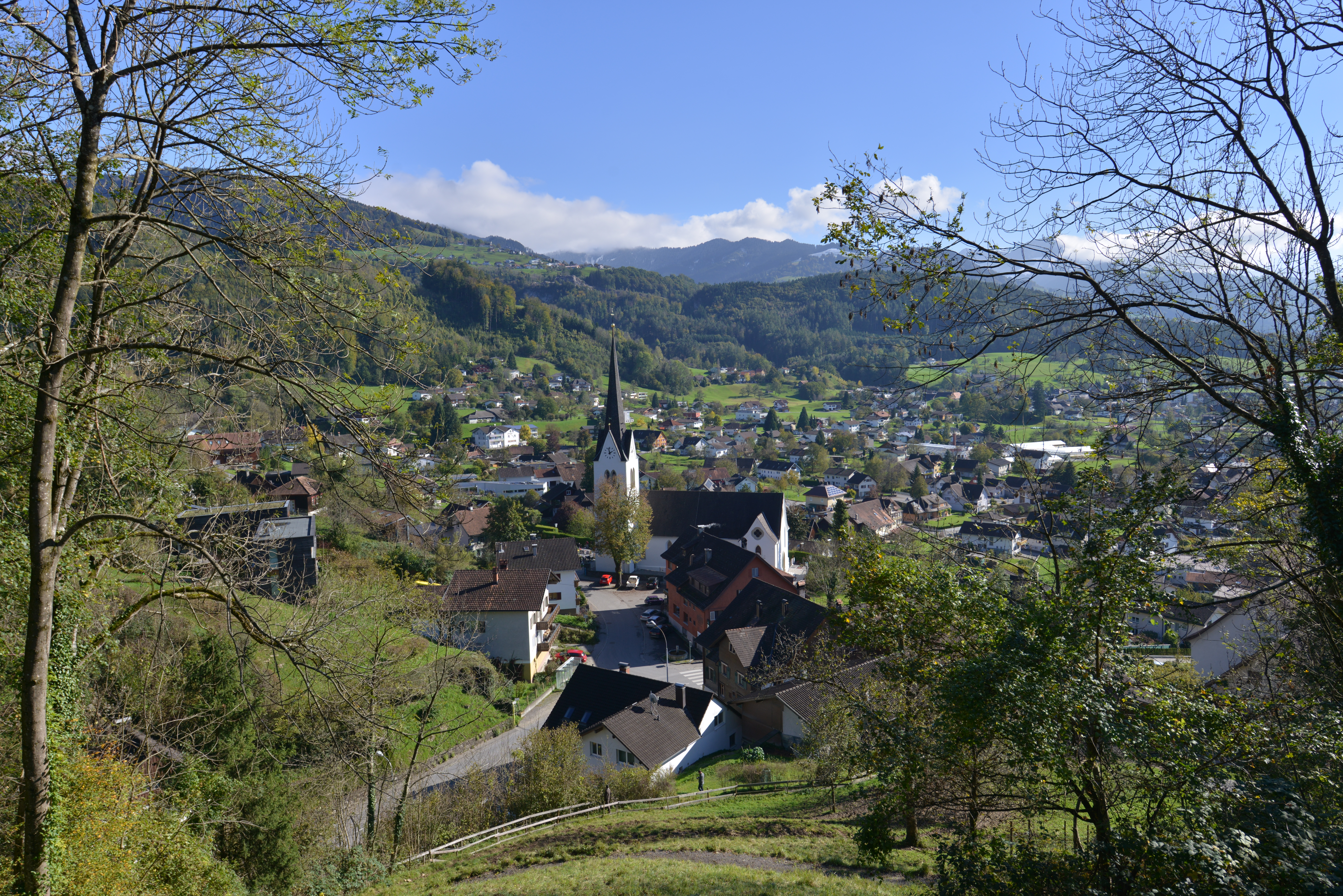 Kirchdorf in Klaus,Vorarlberg